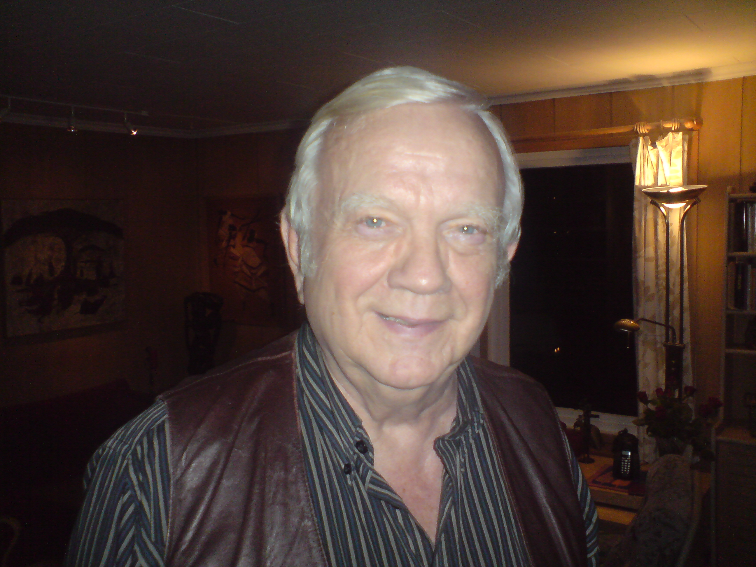 Halle Jorn Hanssen